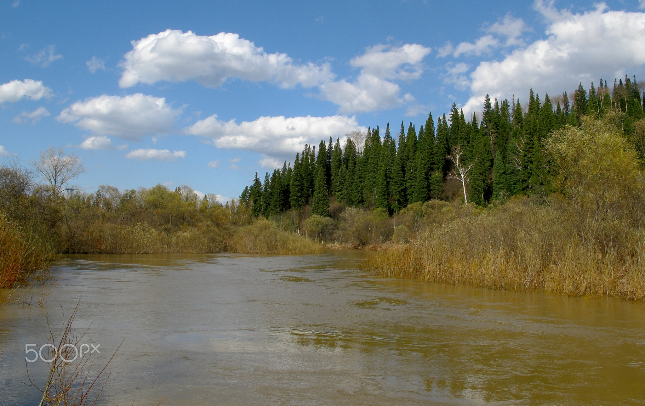 500px provided description: ?????? ??????? ??? [#????? ????????? ?????? ???? ????? ???? ???????? ??????]